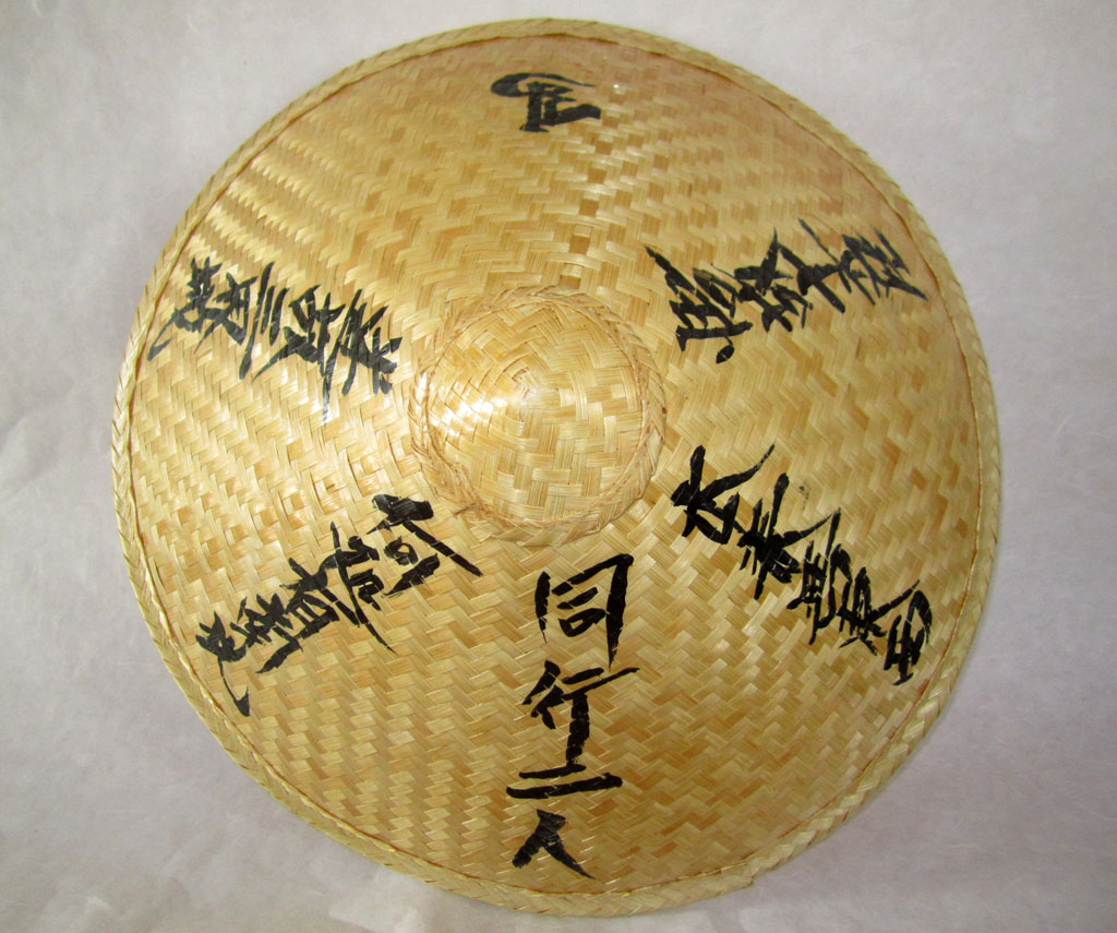 お遍路で使用する笠を上から撮影。